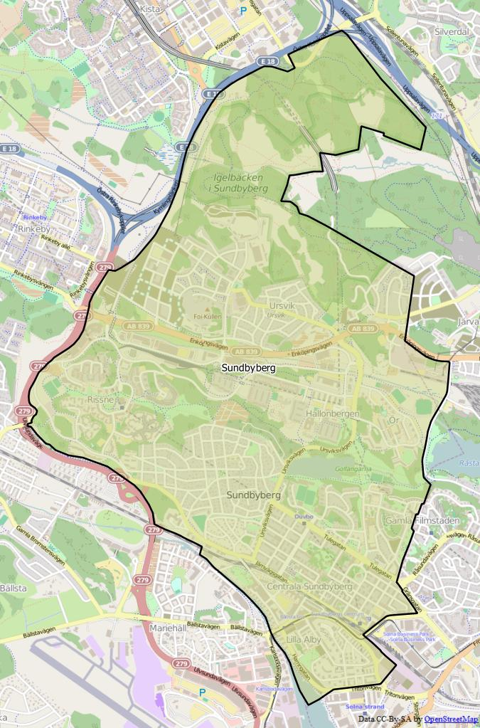 Distriktsindelningen i Sundbybergs kommun World file: 10.74454295971701256 0 0 -10.74454295971701256 1995289.26097366167232394 8268198.54476163070648909